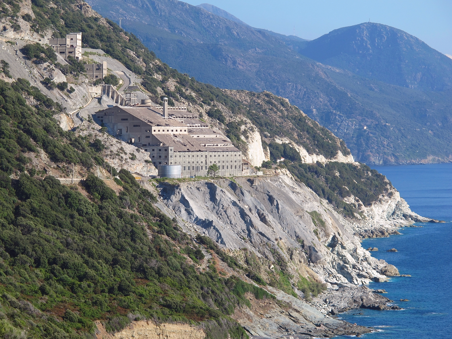 L'ancienne usine d'amiante de Canari (Corse) le 8 août 2019.